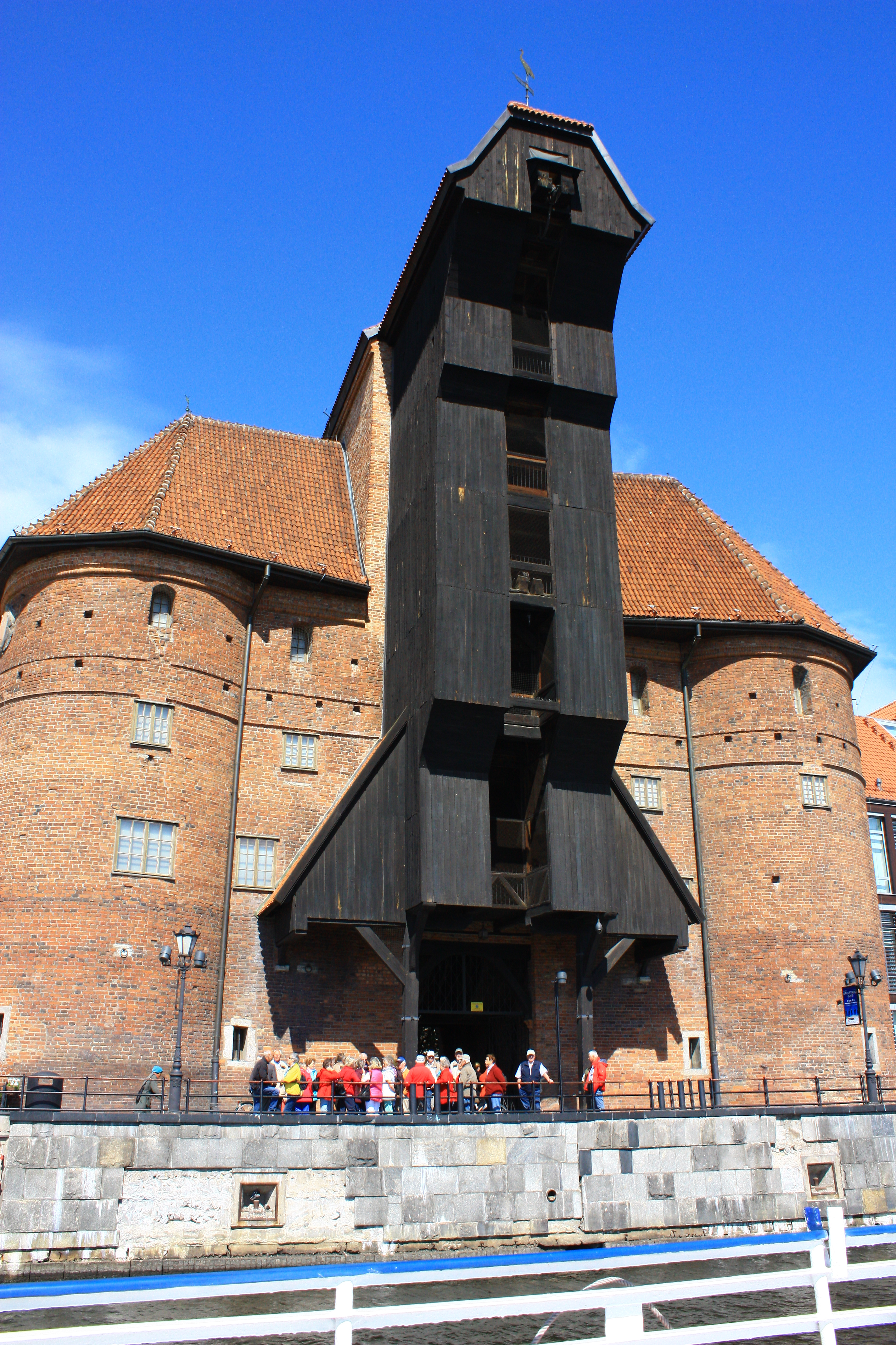 Gdańsk, Żuraw i Brama Świętego Ducha.